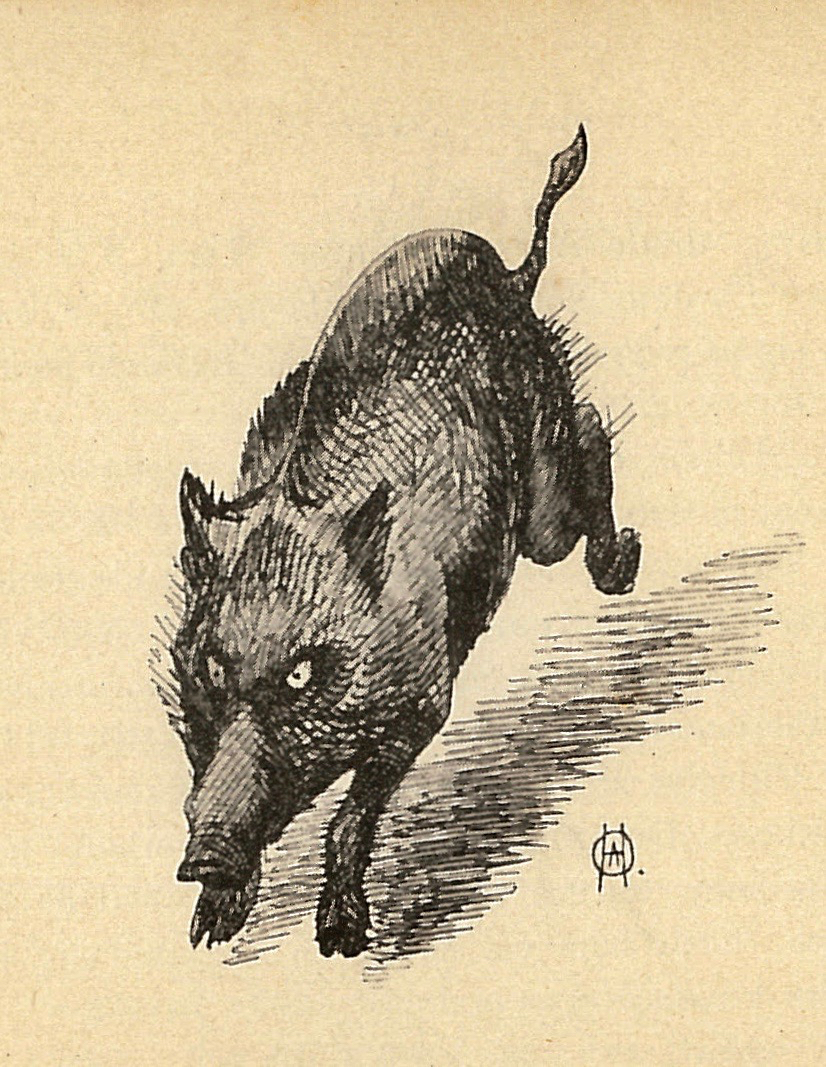 Gravso eller glumso af O. A. Hermansen, fra Bondesen; Æventyrets Dyreverden, Kjøbenhavn 1887